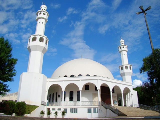 Mesquita Omar Ibn Al-Khattab em Foz do Iguaçu (Paraná), Sul do Brasil. A pedra fundamental foi lançada em 1981; inaugurada em 23 de março de 1983, está situada numa área total de 20 mil metros quadrados. Sua área construída é de 600m² (o salão oval de orações ocupa cerca de 400m²).